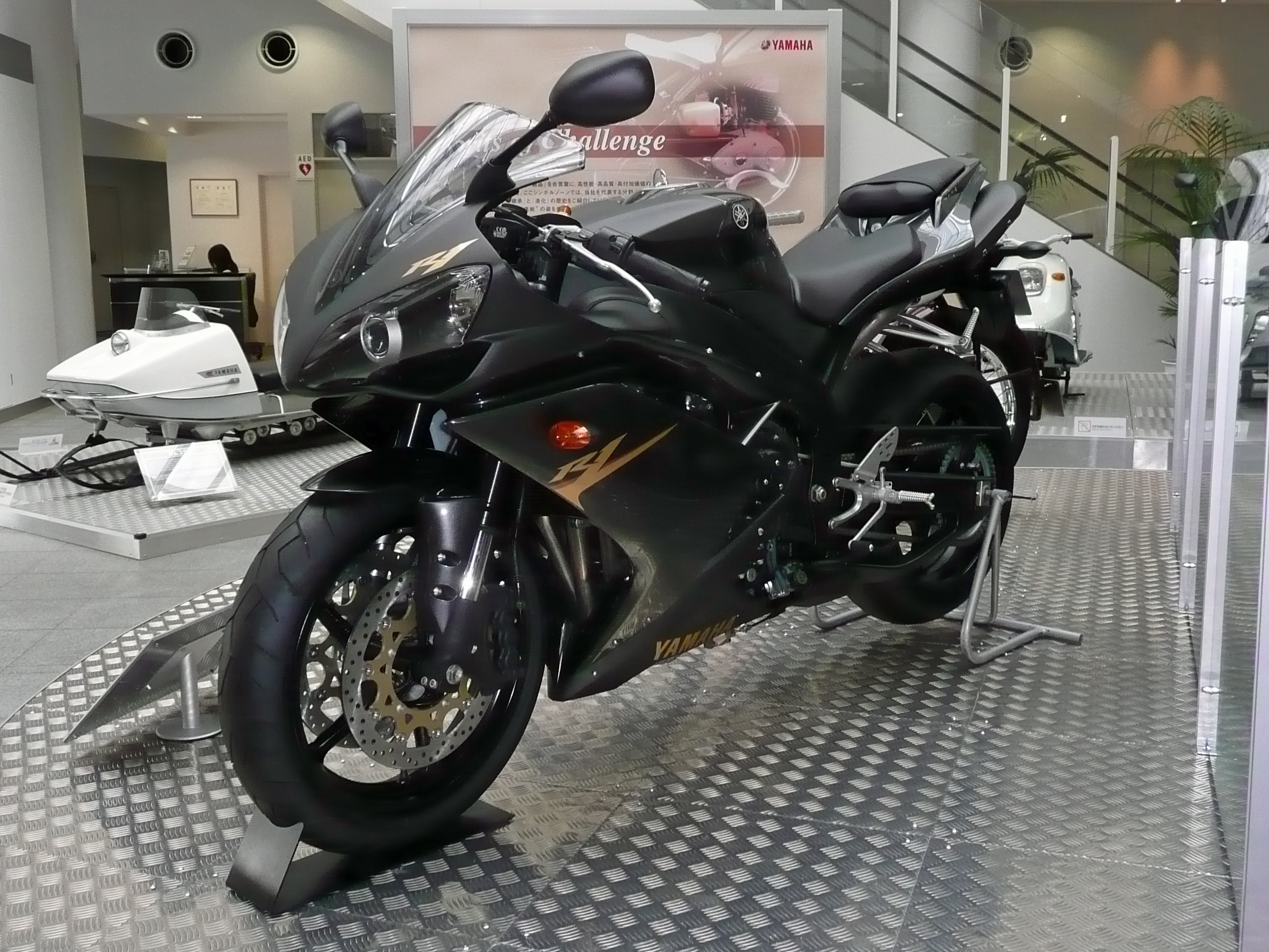 ヤマハ・YZF-R1 2008 左側面 ヤマハコミュニケーションプラザにて撮影